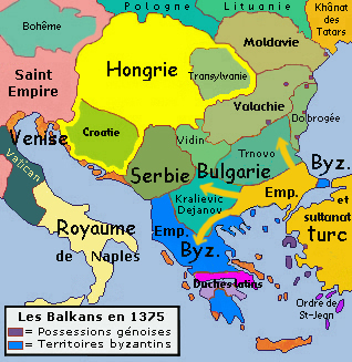 Les Balkans en 1375, lors de l'arrivée des Turcs en Europe. Carte des Balkans en 1375